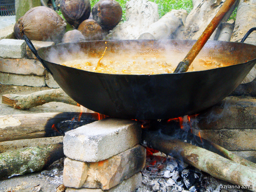 Gulai-Indonesian curry